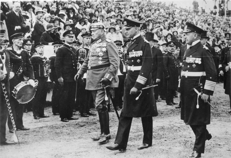 Reichspräsident v. Hindenburg und Admiral Raeder beim Stapellauf des Panzerschiffes "Deutschland" in Kiel [1931] 17189-33